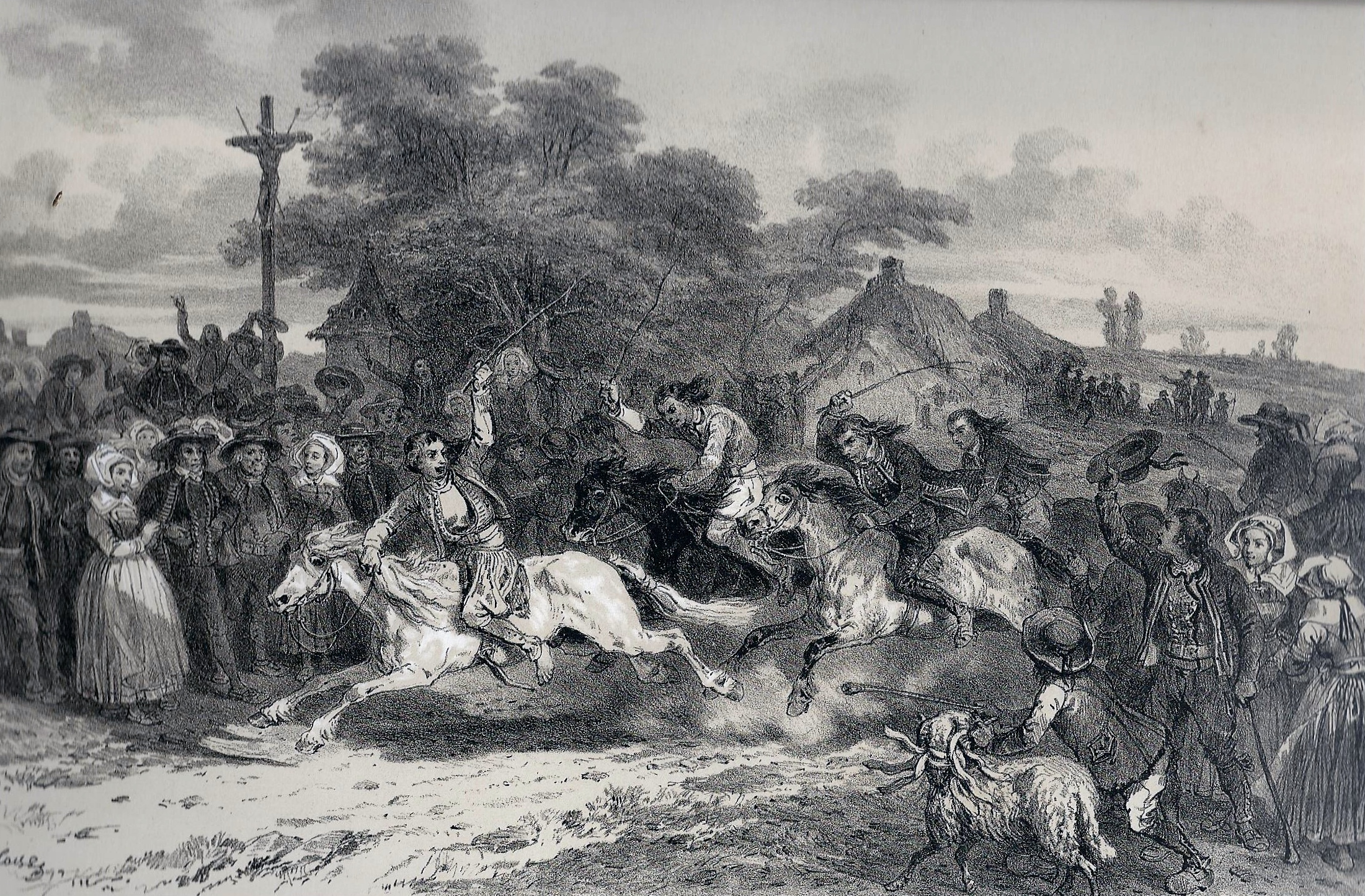 "Une course à Carhaix" (dessin de François Hippolyte Lalaisse publié dans Félix Benoist, "La Bretagne contemporaine", tome "Finistère", 1867).